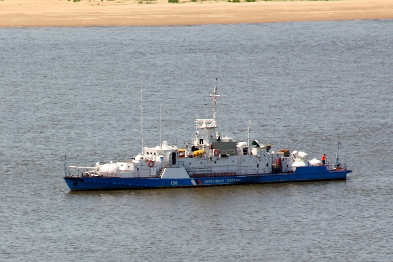 ПСКР-322 Василий Поярков, пр.1248, Хабаровск 2008.07.09